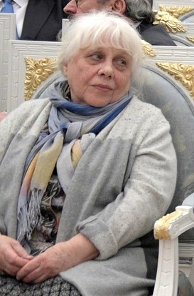 Советский и российский художник-постановщик мультипликационных фильмов Франческа Ярбусова